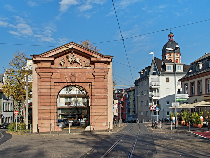 Tonemapping Bild des Gautors in Mainz im Herbst 2011